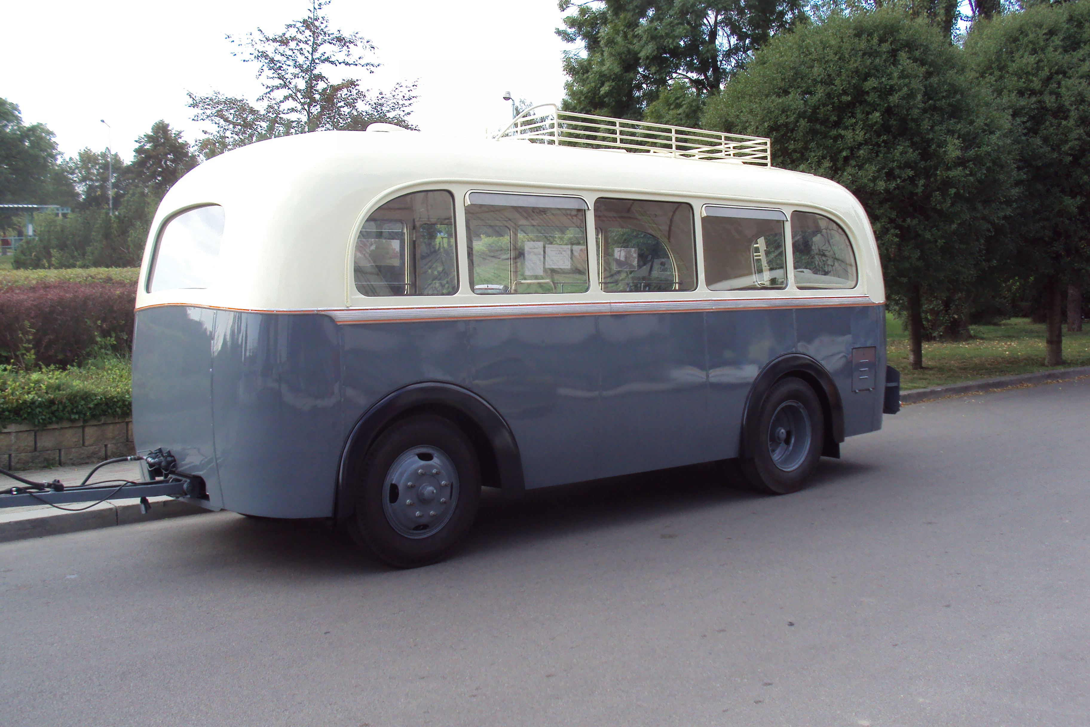 Vlečňák SODOMKA PRK6, prezentace historických busů v České Lípě